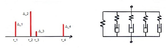 Diskretes Relaxationsspektrum bei einem Feder-Dämpfer-System eines Maxwell-Typ